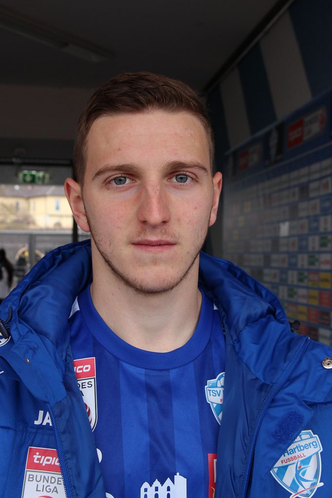 Meris Skenderovic (Hartberg)